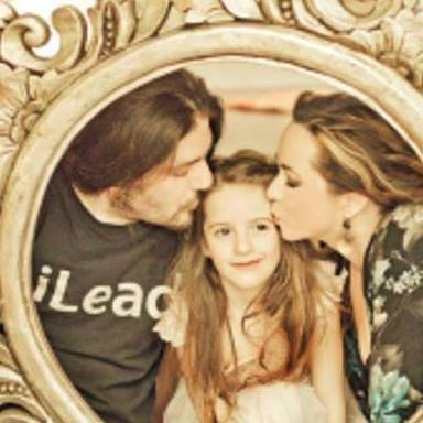 Barabás Lujza (művésznevén: Luisa Barabas) családjával